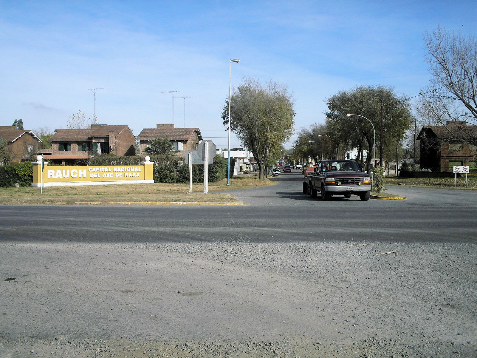 Vista ingreso Ciudad de Rauch Pcia. de Buenos Aires